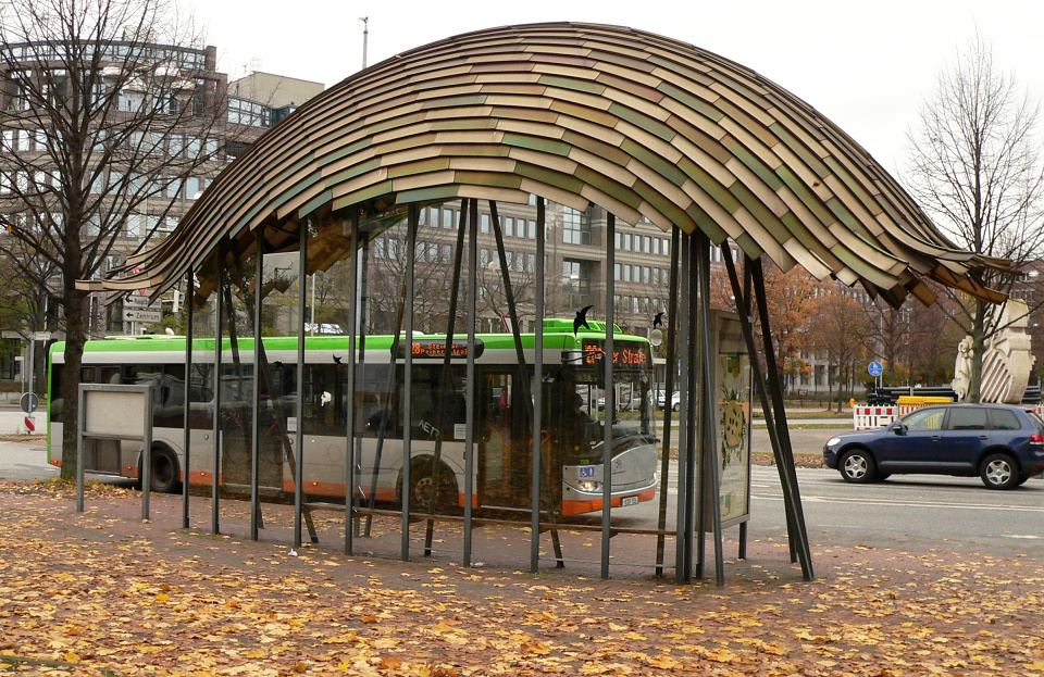 Busstops Braunschweiger Platz